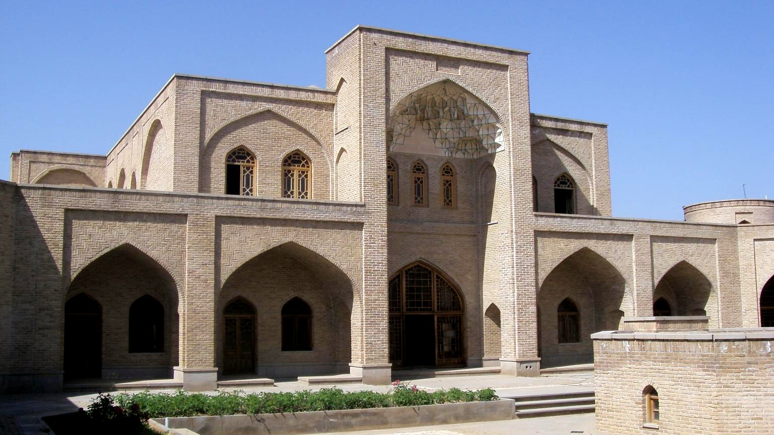 Shah Abbasi caravanserai of Marand, Iran